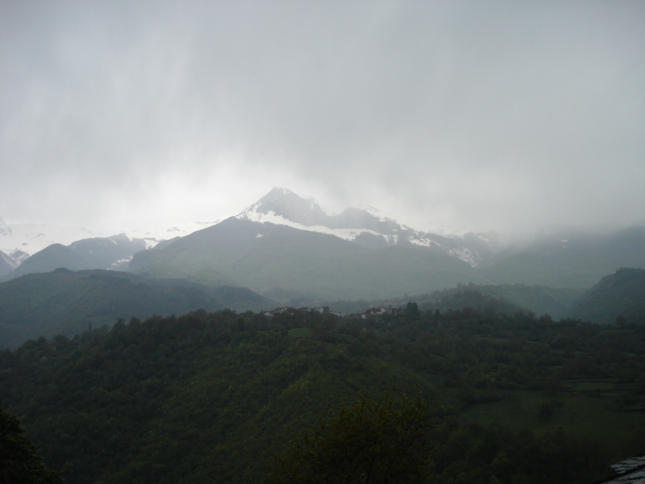 Поглед към планината Дешат от Бигорския манастир "Свети Йоан".